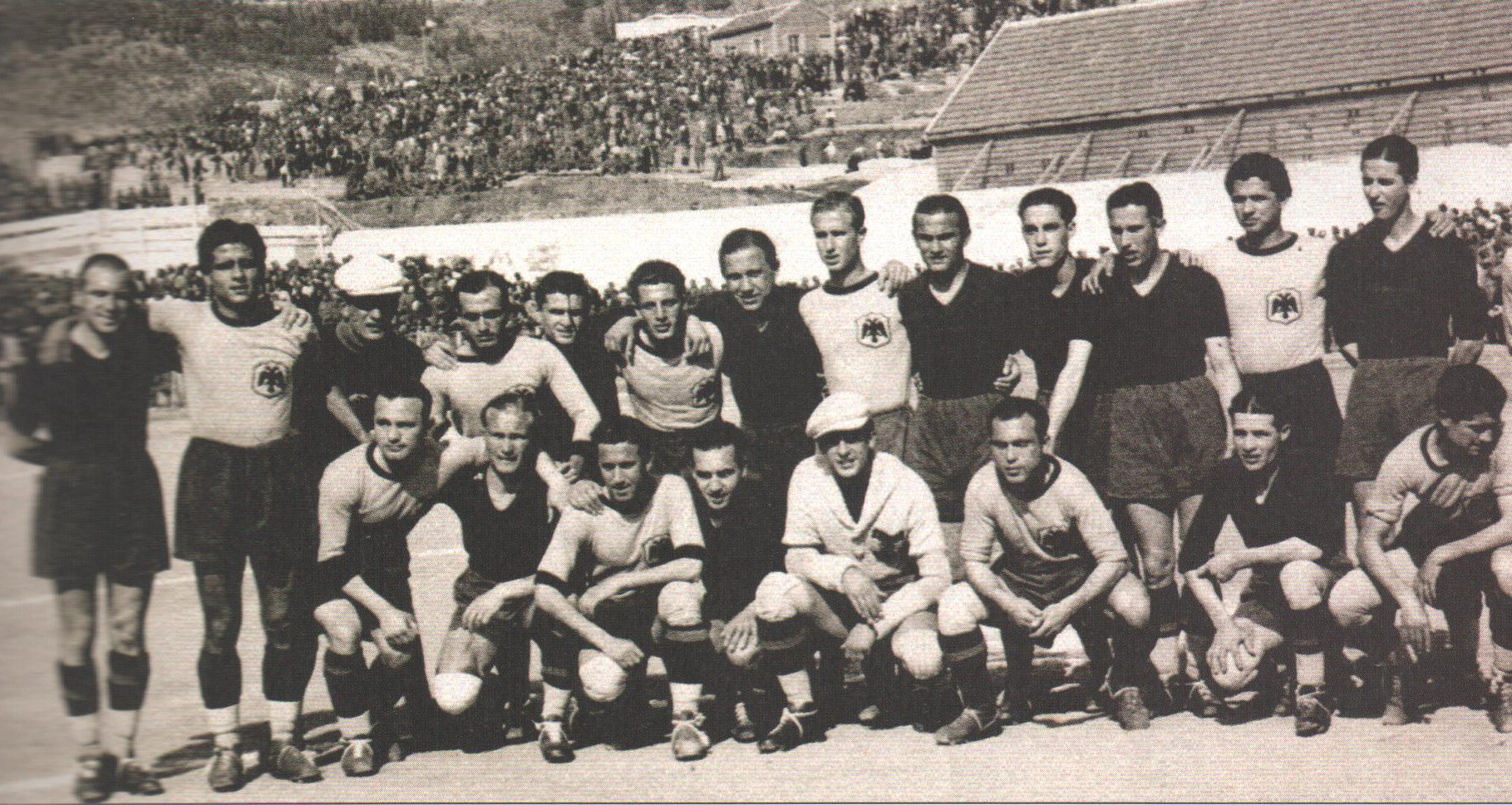 Οι ομάδες του Άρη και της ΑΕΚ στον ημιτελικό του Κυπέλλου Ελλάδας 1940